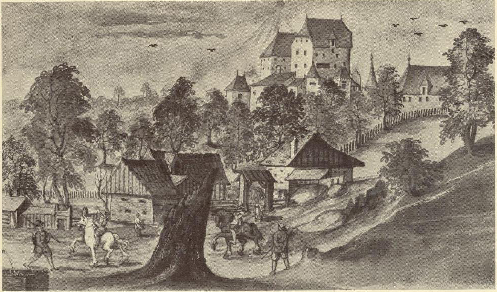 Ehemaliges Schloss Neudeck bei Bad Birnbach nach einem Aquarell Friedrich Casimirs